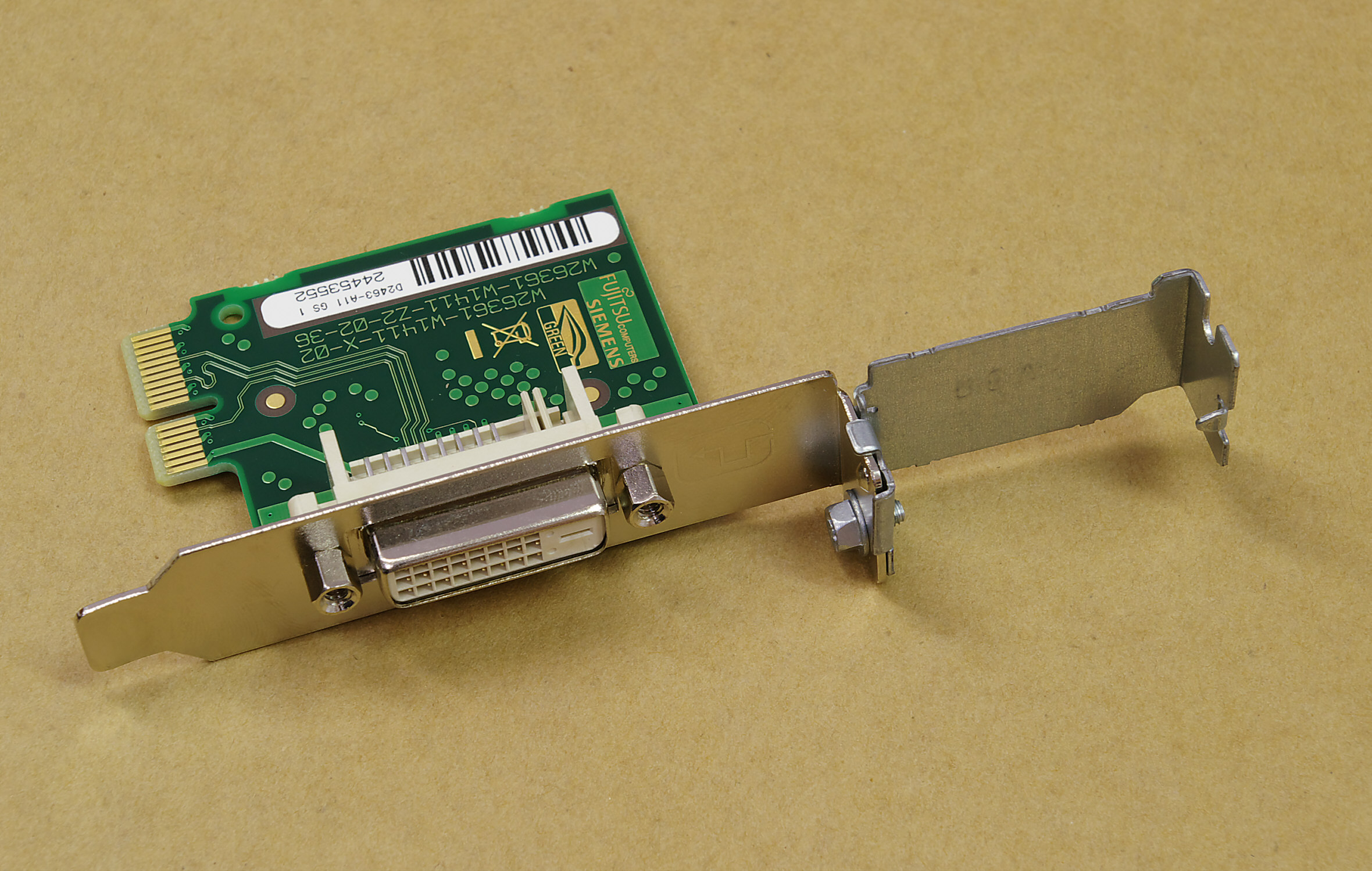 Proprietärer DVI-Slotblechadapter. Besonderheit: Slotblech teilbar, deshalb auch für Low-Profile-Gehäuse einsetzbar